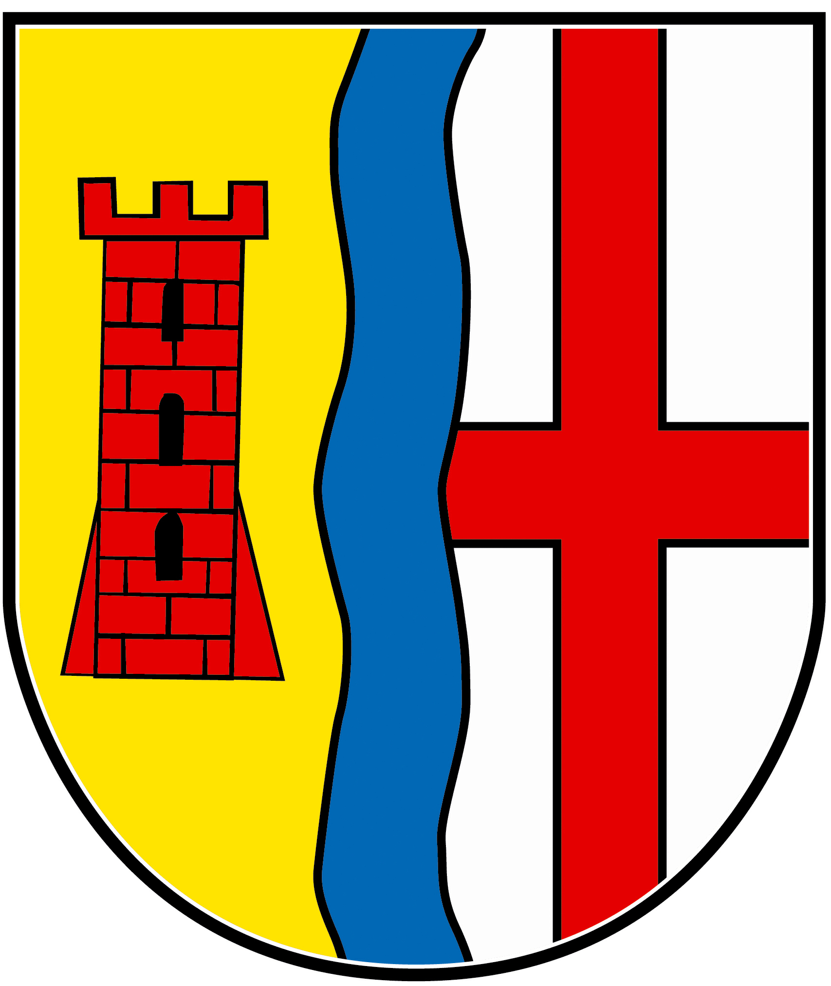 Wappen der Ortsgemeinde Kastel-Staadt